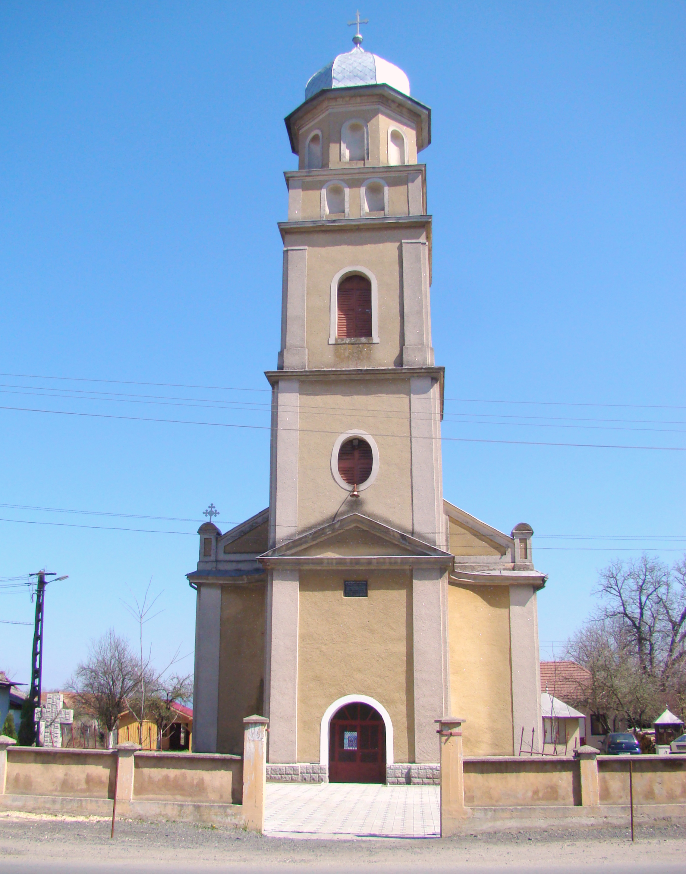 Dobra, județul Hunedoara